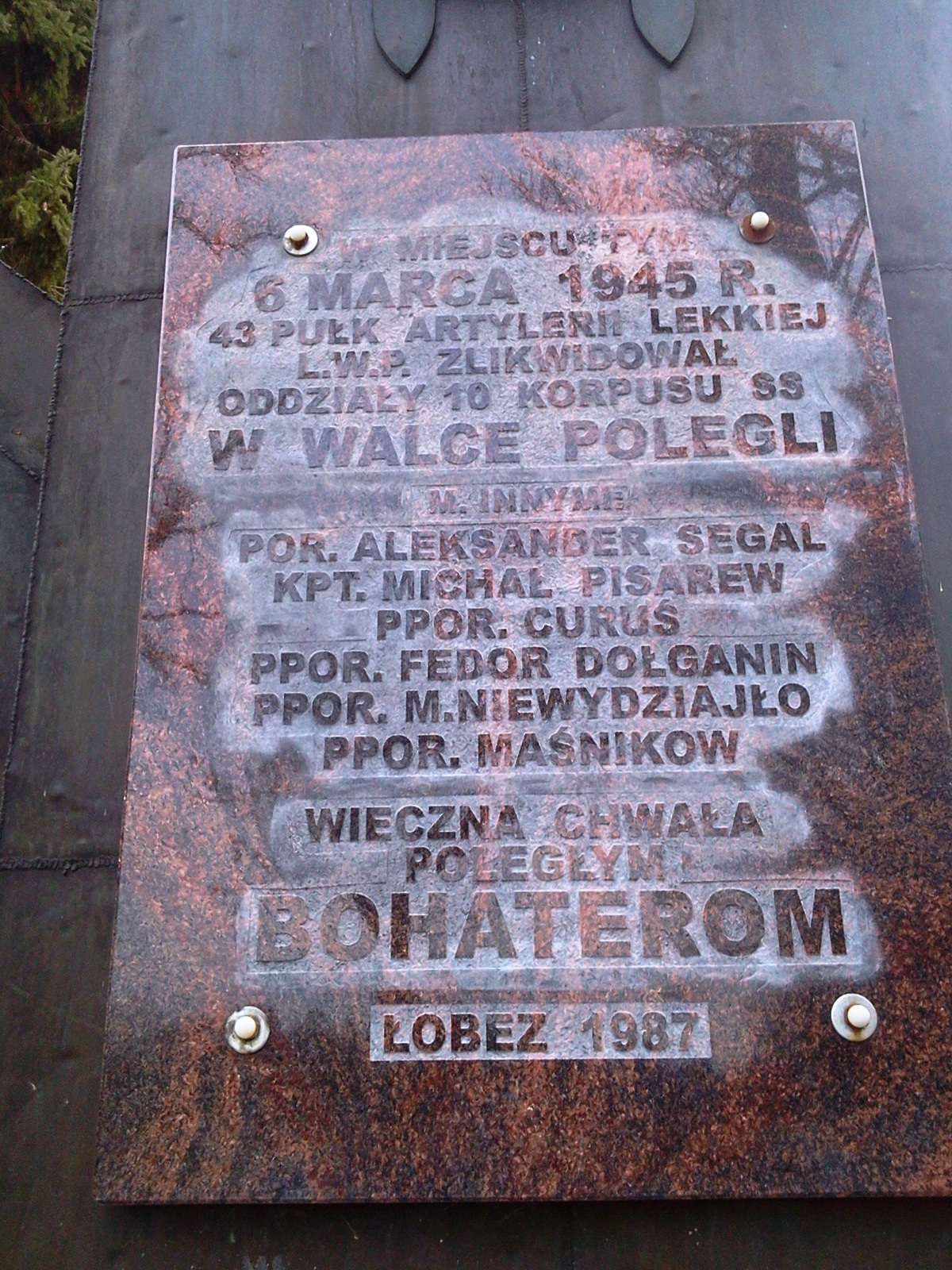 Łobez - napis na tablicy w Świętoborcu